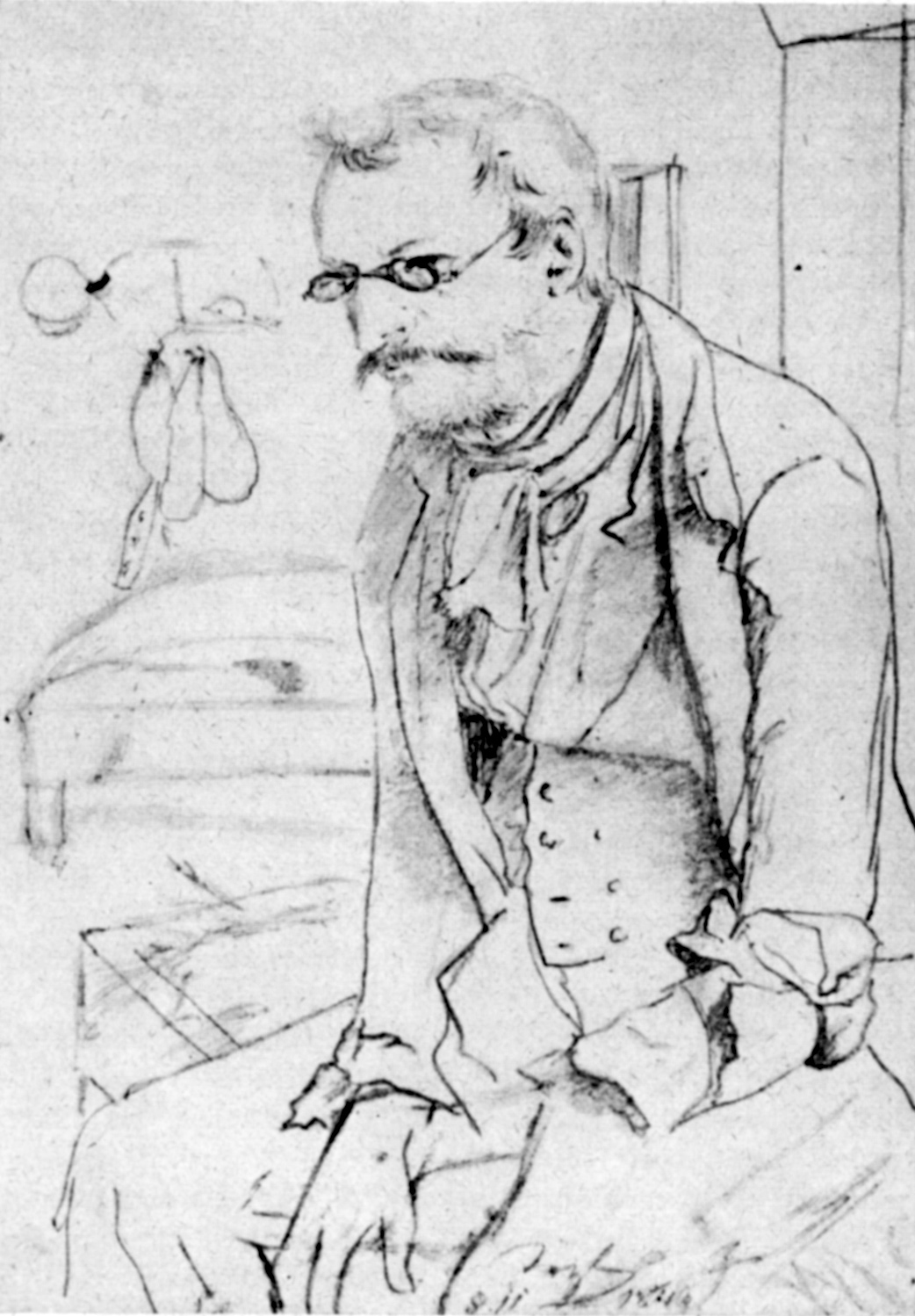 Aloys Beckert, badischer Revolutionär